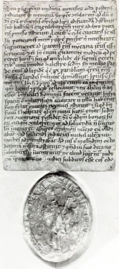 Stadtbrief Leipzigs durch Markgraf Otto von Meißen